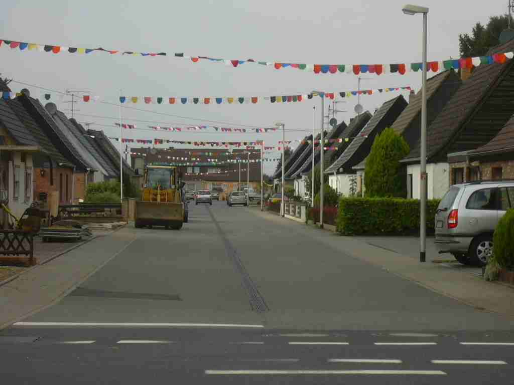 Das "Tonnedörp", die Siedlung Kerpener Straße, am Stadtrand von Düren